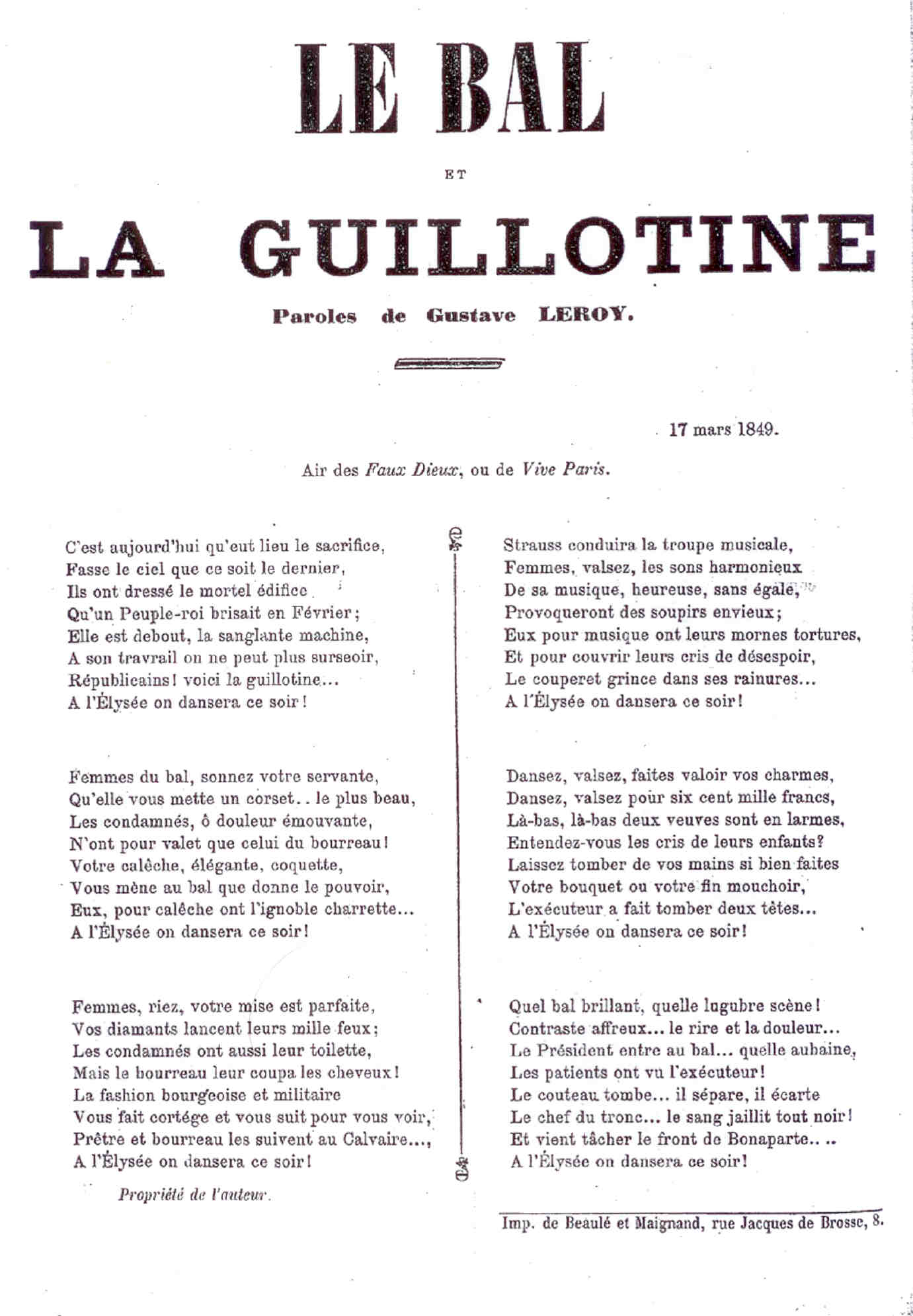 Chanson éditée par l'auteur en feuille volante, qui valut à Gustave Leroy 300 francs d'amende et 6 mois de prison passés à la prison des Madelonnettes.